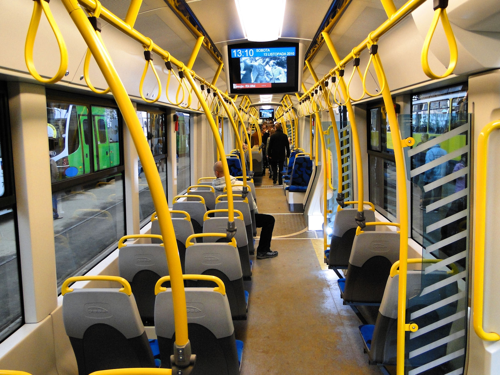 Tramwaj PESA 120Na SWING (wersja dla Szczecina)